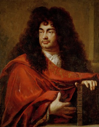 Portrait de Montfleury, Collection La Comédie-Française.